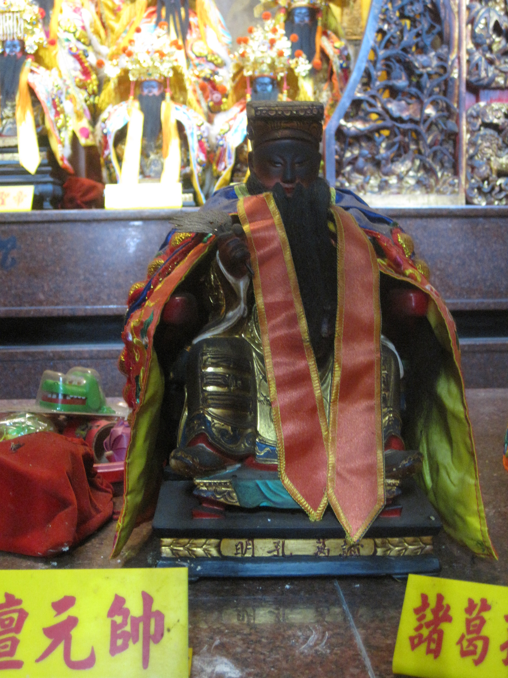 鹽行禹帝宮諸葛孔明神像